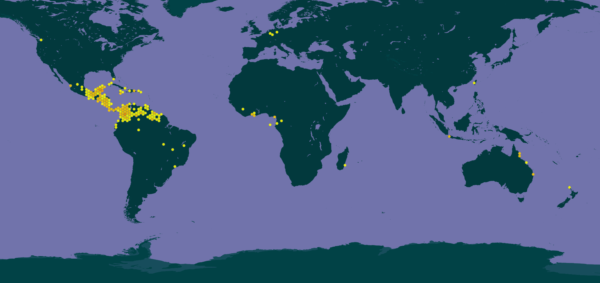 Distribuição geográfica de Cecropia peltata